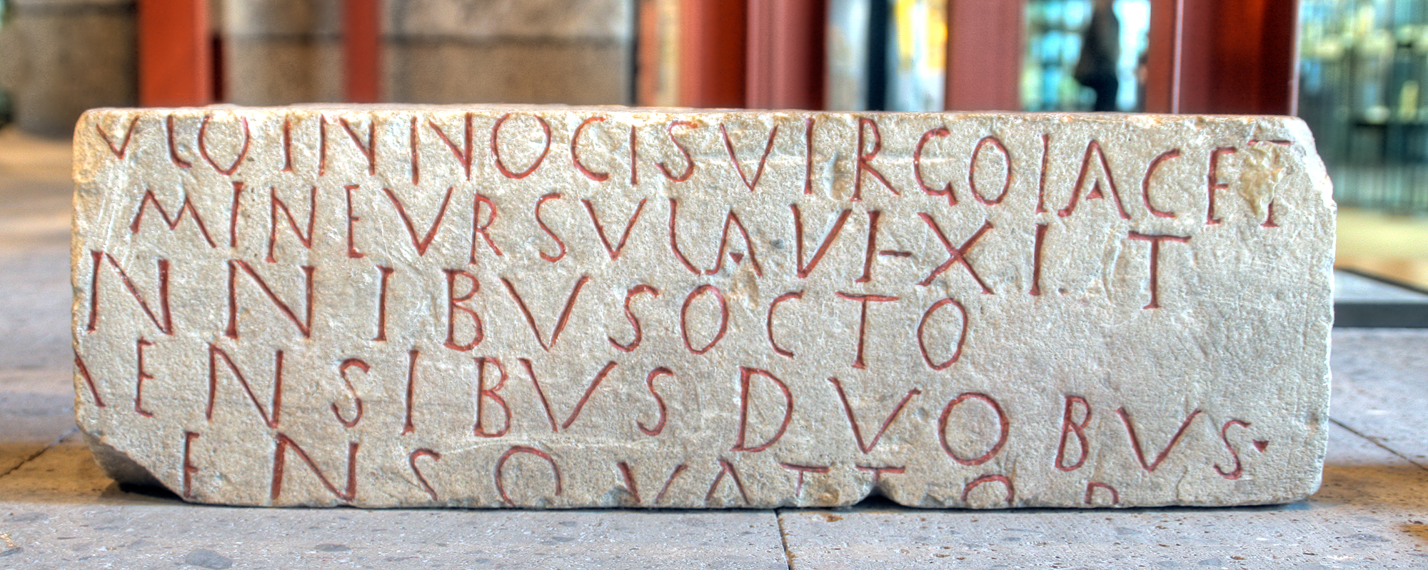 Christlicher Grabstein für die Jungfrau Ursula, im Römisch-Germanischen Museum Köln. 5./6. Jahrhundert nach Christus, Fundort: St. Ursula, Köln. RGM Inv.-Nr. 29,313Inschrift Latein: in hoc tumVLO INNOCIS VIRGO IACET noMINE VRSVLA VIXIT aNNIBUS OCTO MENSIBVS DVOBUS dIENS QVATTOR CIL XIII 8485 Übersetzung Deutsch In diesem Grab ruht die unschuldige Jungfrau namens Ursula. Sie lebte acht Jahre, zwei Monate, vier Tage